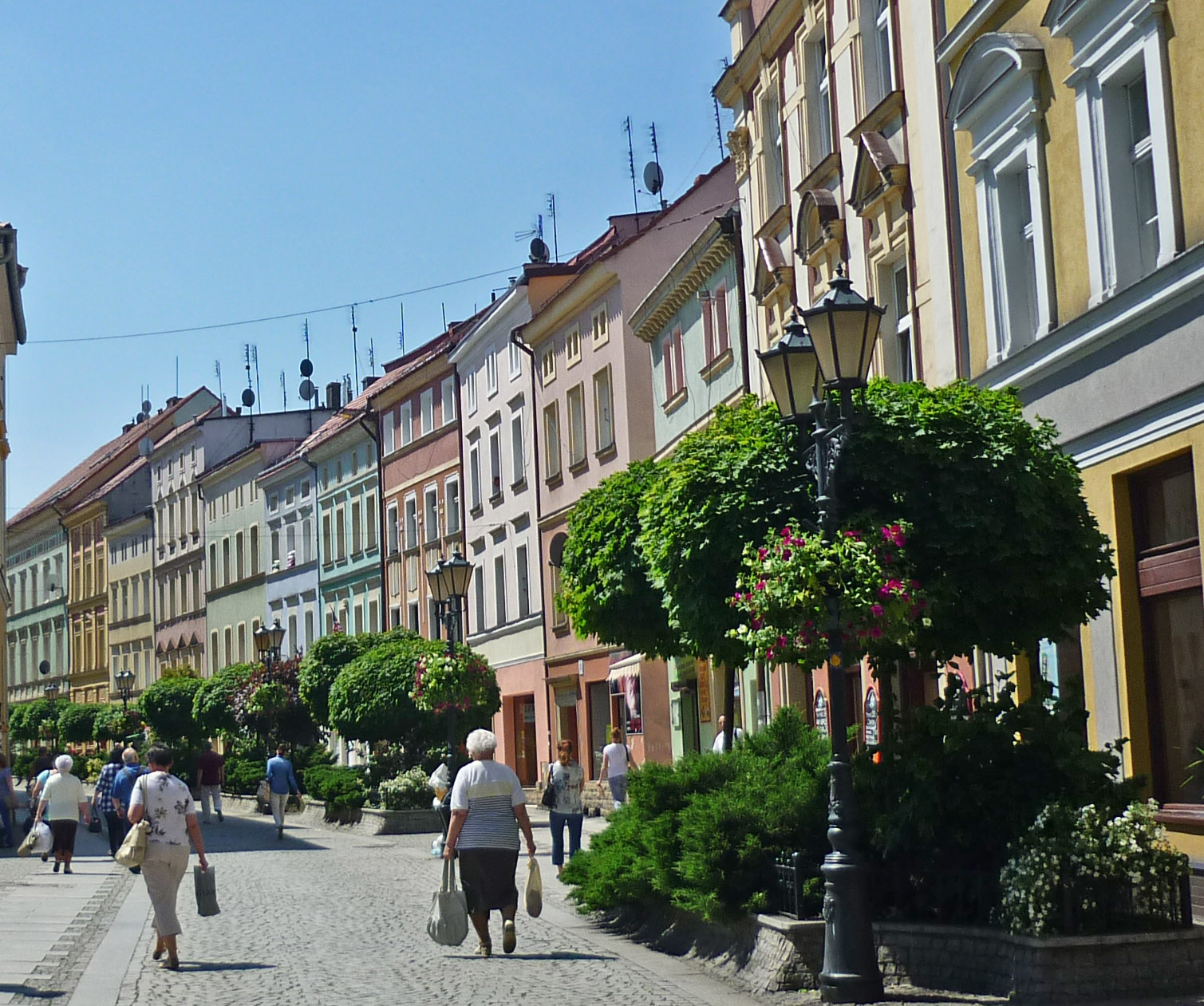 Stadthäuser and der Basztowa Staraße in Złotoryja (Goldberg) in der polnischen Woiwodschaft Niederschlesien